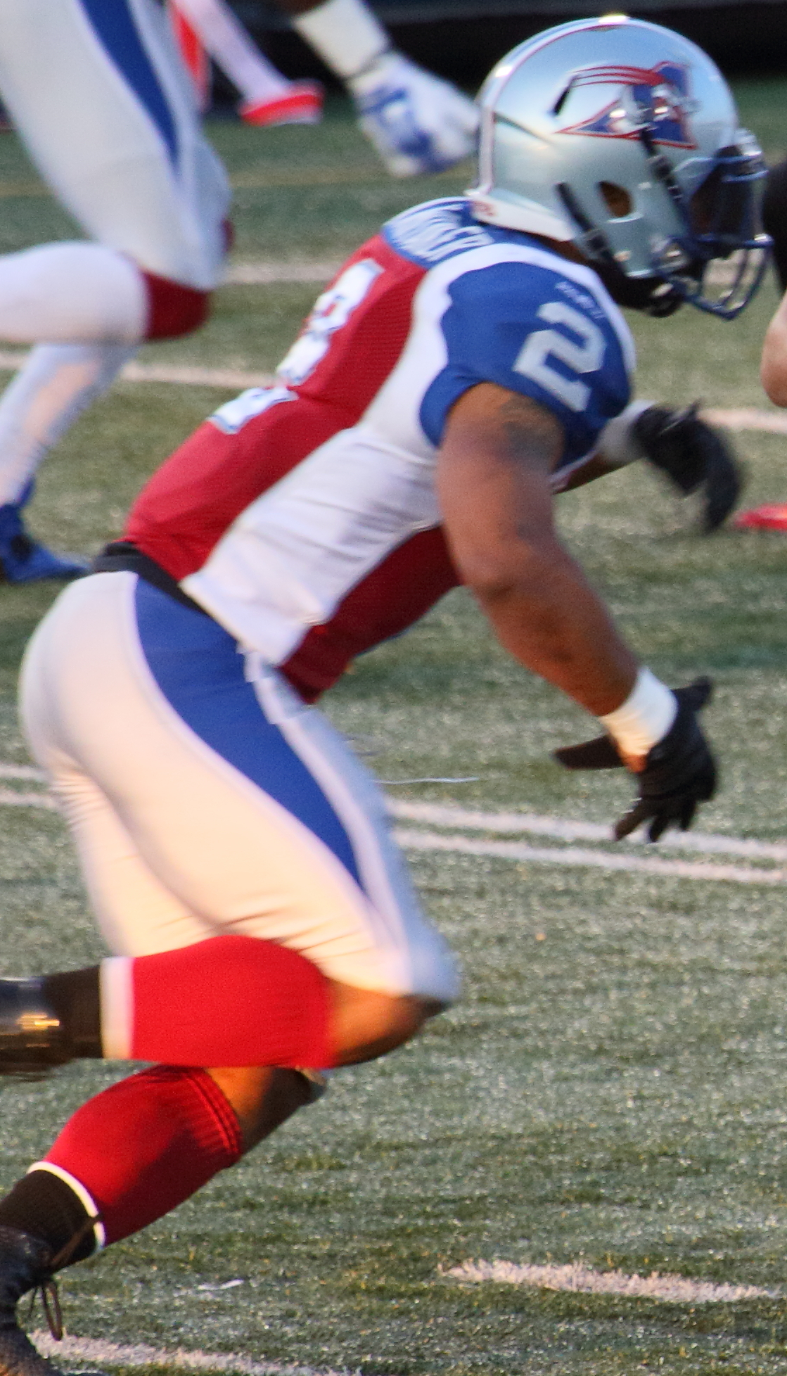 Jonathan Crompton et Brandon Whitaker, Alouettes de Montréal, lors d'un match préparatoire contre le Rouge et Noir d'Ottawa.